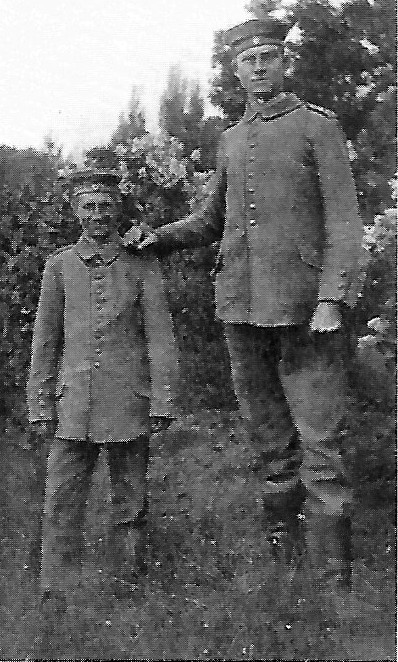 Der größte und der kleinste 15er